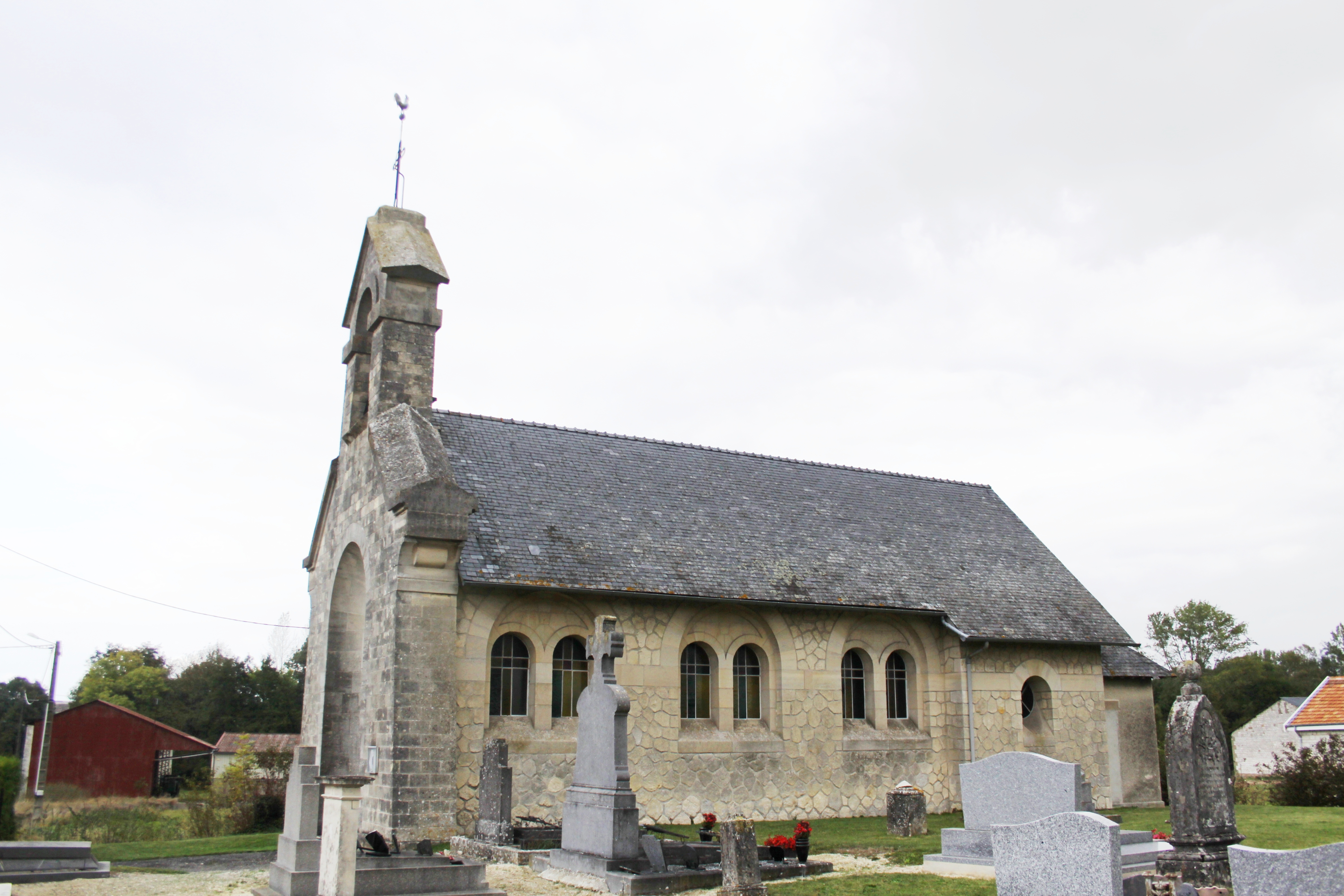 Village Ardennais